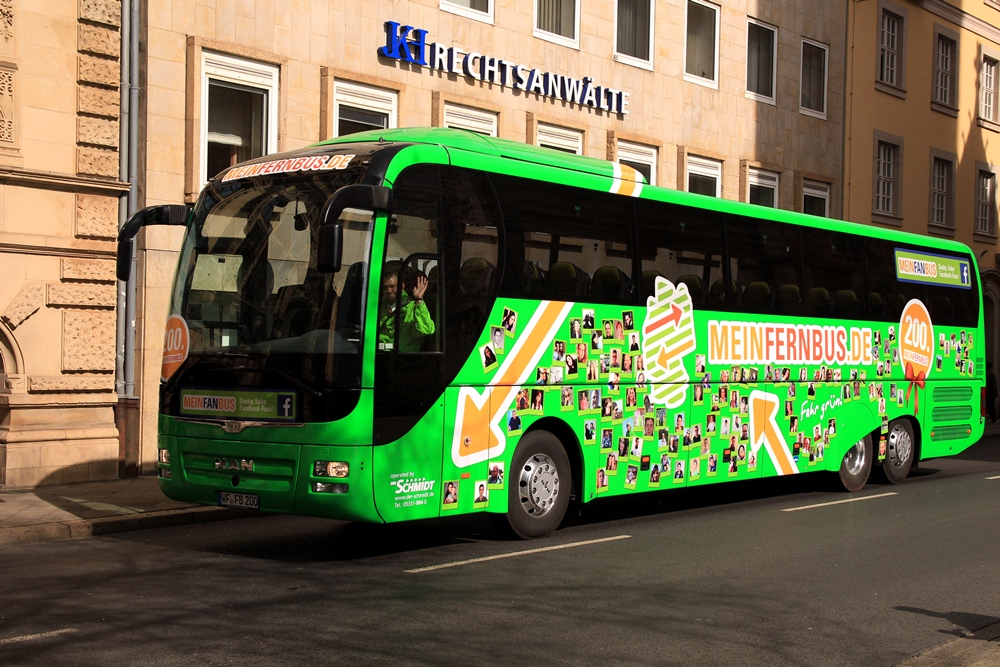 200. MeinFernbus, der MeinFanBus